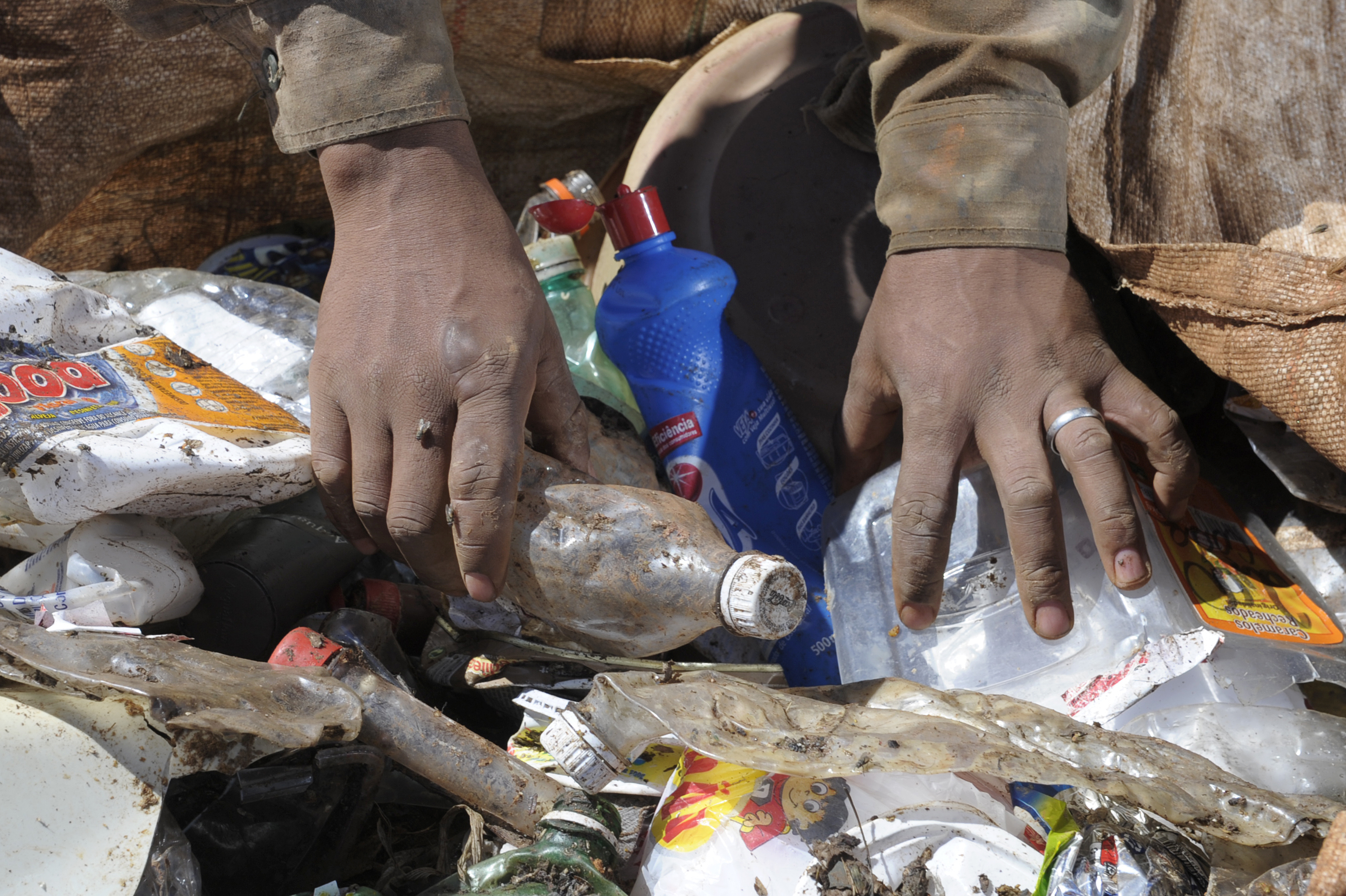 BIE - Banco de Imagens Externas. Lixão da Estrutural. Os municípios poderão ter mais dois anos e contar com recursos federais para se adaptarem à Política Nacional de Resíduos Sólidos, a lei que, entre outras mudanças, prevê o fim dos lixões. A decisão foi anunciada pelo senador Romero Jucá (PMDB-RR) durante o debate da MP 651/2014. Foto: Edilson Rodrigues/Agência Senado